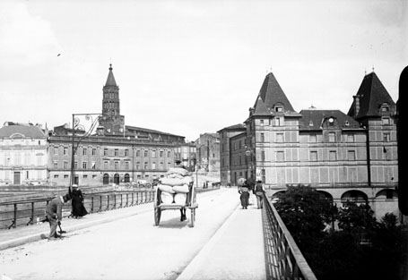 Fonds Trutat - Photographie ancienne Cote : TRU C 1086 Localisation : Fonds ancien (S 30) Original non communicable Titre : Sur le pont, Montauban, 16 juin 1899 Auteur : Eugène Trutat (1840–1910) Alternative namesEugene TrutatDescriptionFrench photographer, naturalist and geologistDate of birth/death25 August 18406 August 1910Location of birth/deathVernon, EureFoix, AriègeAuthority control : Q960669 VIAF: 17277984 ISNI: 0000 0003 5411 9587 LCCN: no99011442 GND: 174281781 SUDOC: 027780252 WorldCat Rôle de l’auteur : Photographe Lieu de création : Montauban (Tarn-et-Garonne) Date de création : 1899 Mesures : : 6 x 9 cm Observations : Notes de la main de E.Trutat : "Mack" Mot(s)-clé(s) : -- Pont -- Hôtel de ville -- Eglise -- Clocher -- Arbre -- Façade -- Maison -- Eté -- Charrette -- Sac -- Arche -- Fenêtre -- Toit -- Homme -- Costume masculin -- Femme -- Costume féminin -- Balai -- Barrière -- Ville -- Rue -- Montauban (Tarn-et-Garonne) -- Montauban (Tarn-et-Garonne ; canton) -- Midi-Pyrénées (France) -- Pont Vieux (Montauban) -- Eglise Saint-Jacques (Montauban) -- Tarn (France ; rivière) -- 19e siècle, 4e quart -- 14e siècle -- 13e siècle Médium : Photographies -- Négatifs sur plaque de verre -- Noir et blanc -- Mackenstein -- Paysages urbains Bibliothèque de Toulouse. Domaine public